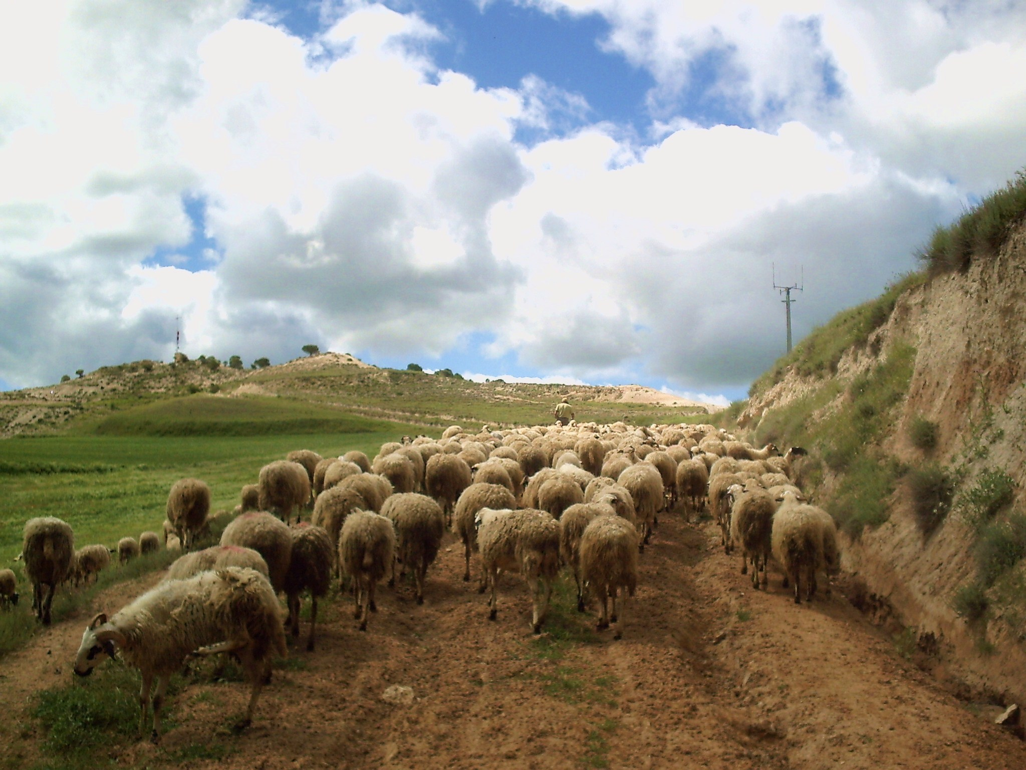 Rebaño.